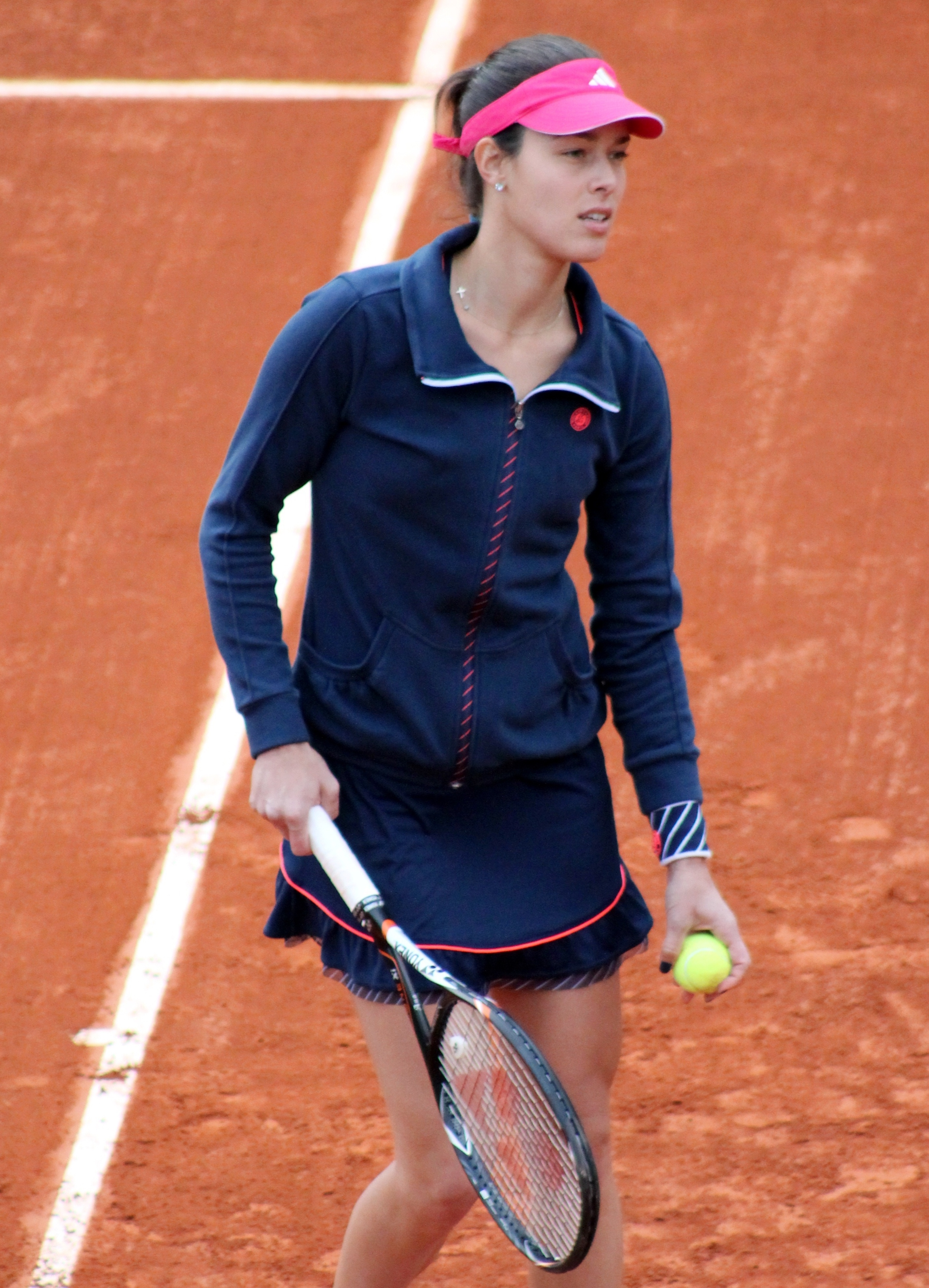 Ivanovic RG13 (4)